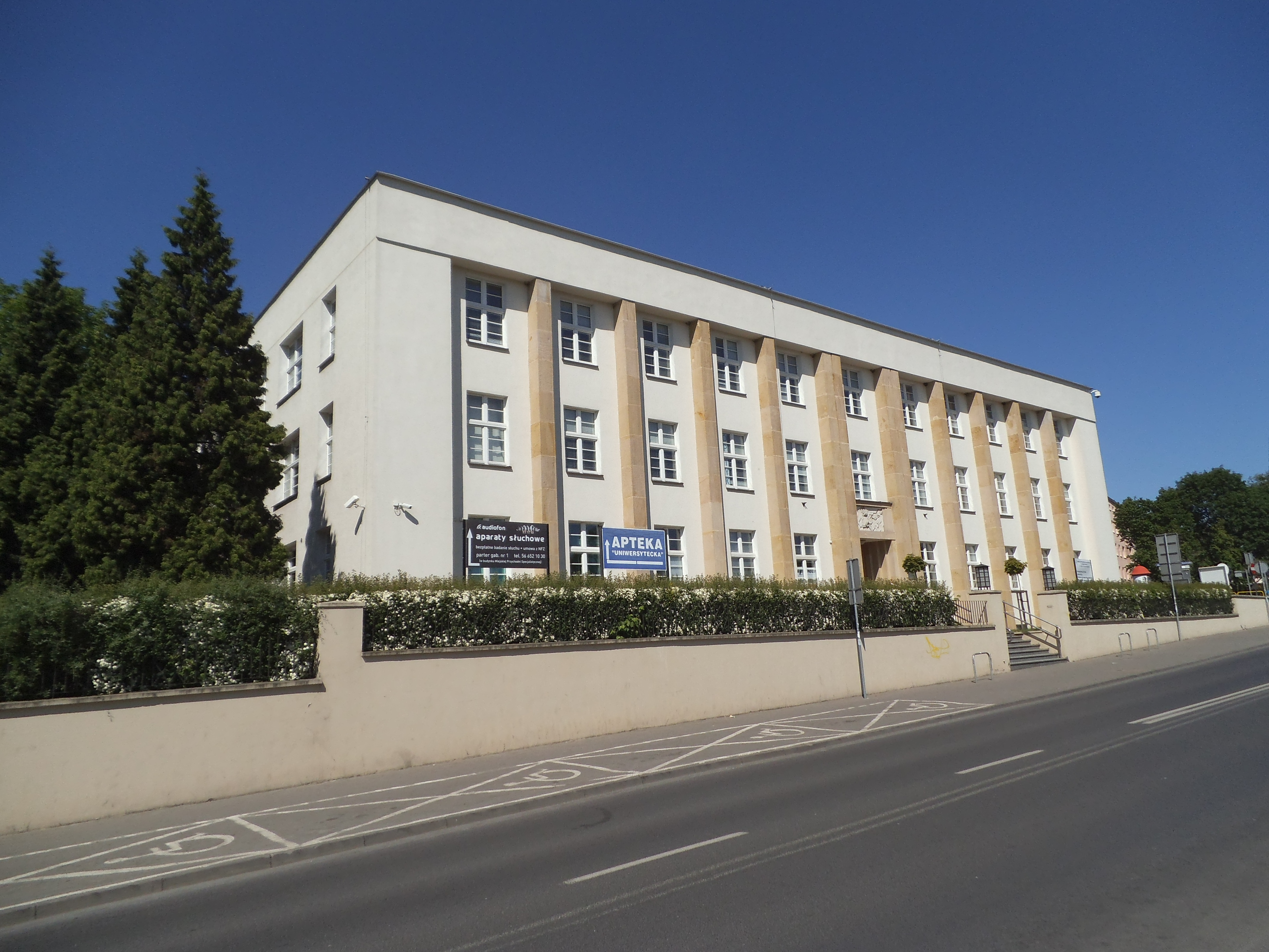 Miejska Przychodnia Specjalistyczna w Toruniu66